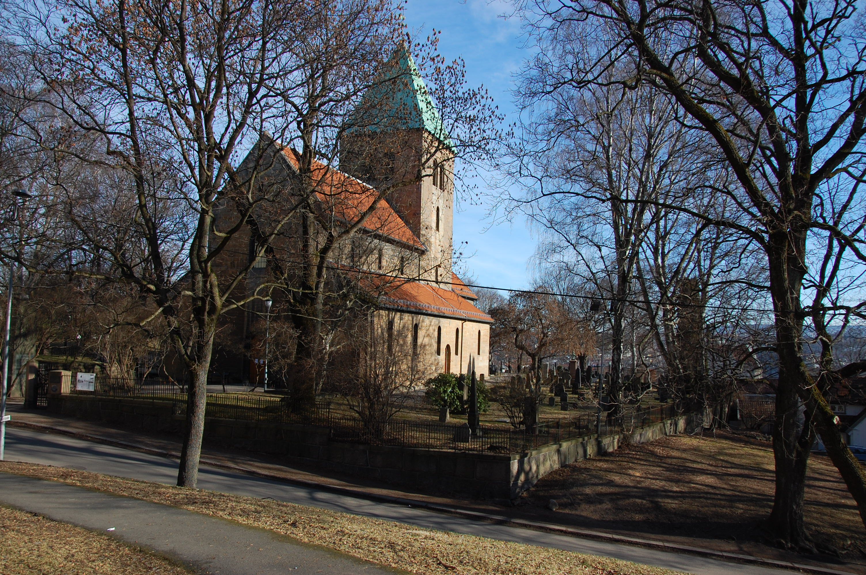 Gamle Aker kirke og kirkegård, Oslo